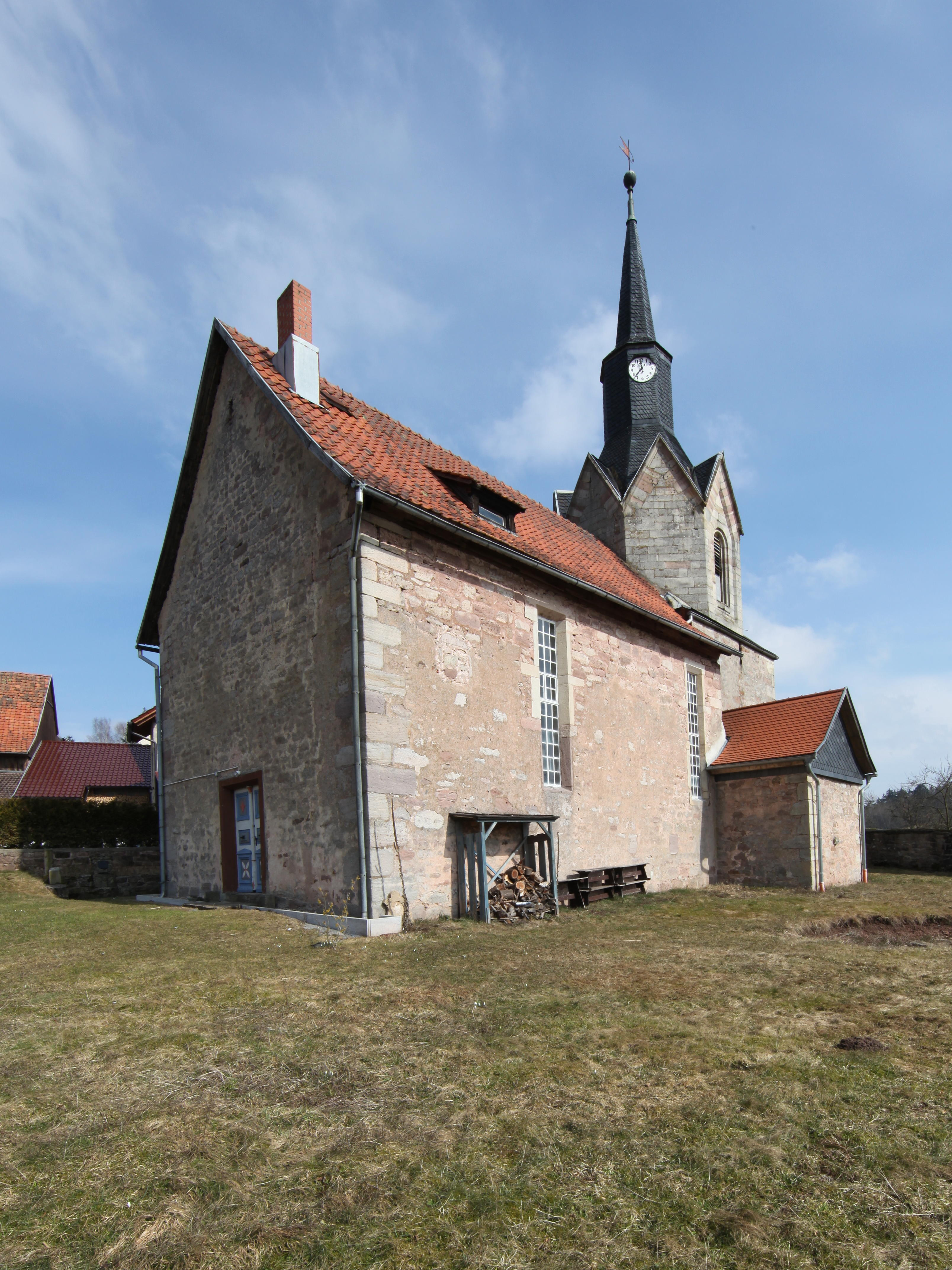 Evangelisch-lutherisch Kirche St. Katharina in Bürden, OT von Hildburghausen